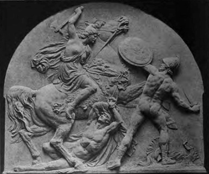 Ernst Herter - Amazonenkampf, c. 1891